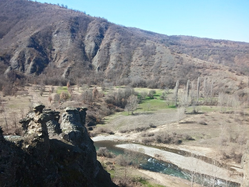 Reka Pčinja u predelu izuzetnih odlika